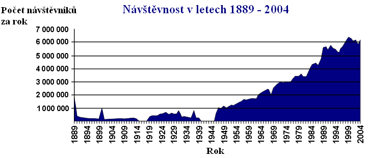 Česky: Graf návštěvnosti Eiffelovy věže